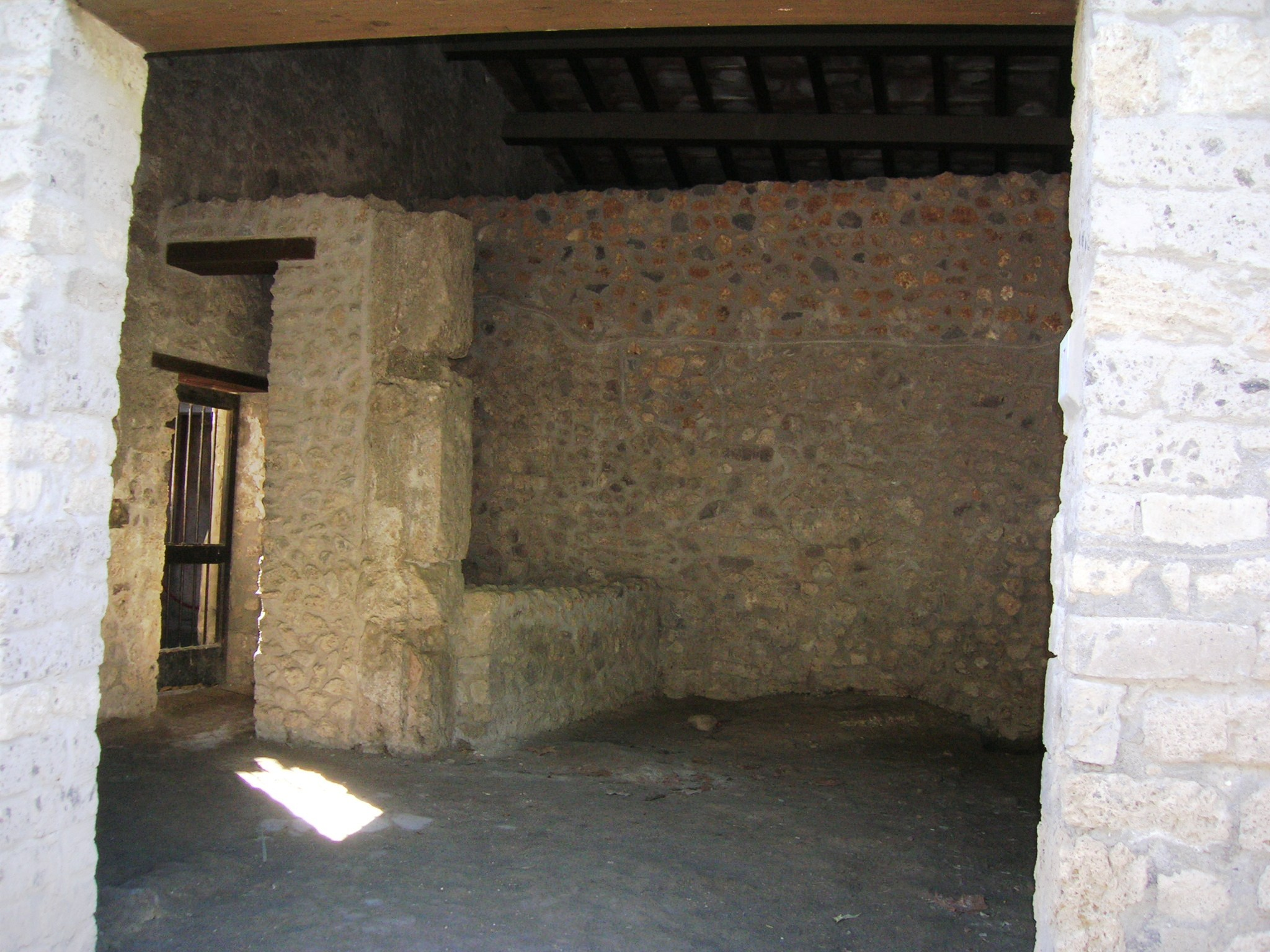 Casa dell'Ara Massima